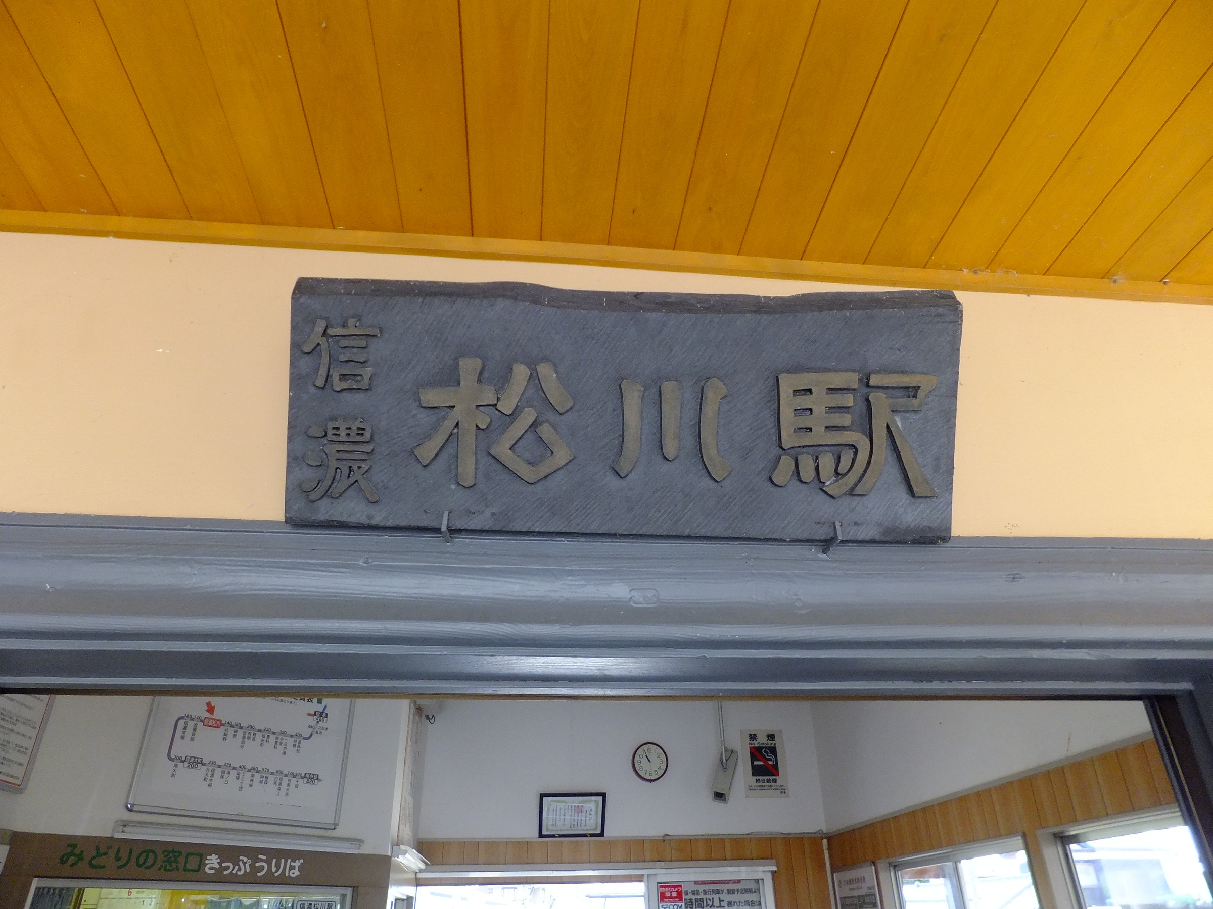 大糸線信濃松川駅駅名板